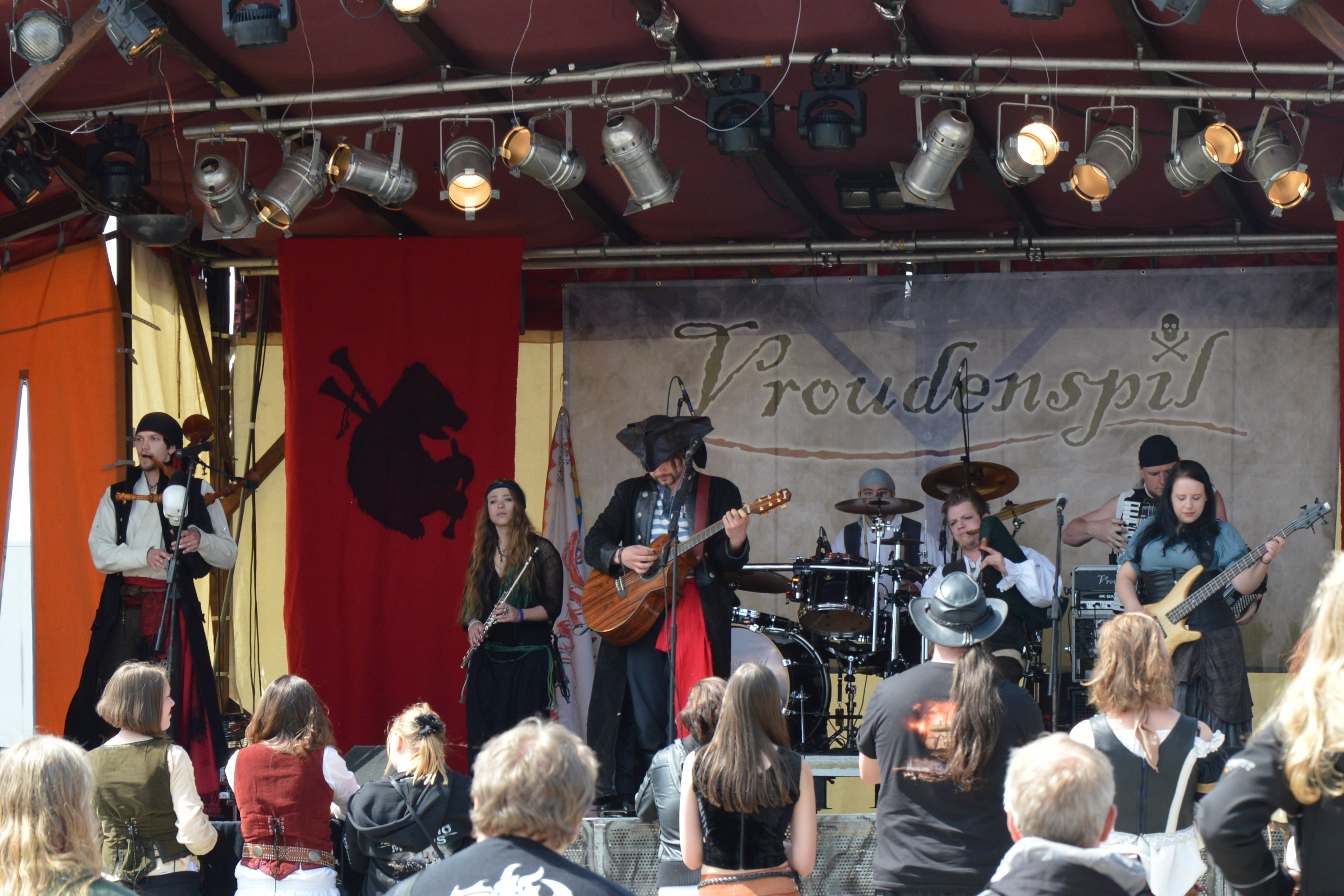 Mittelalterlich Phantasie Spectaculum Weeze 2013 - Vroudenspil